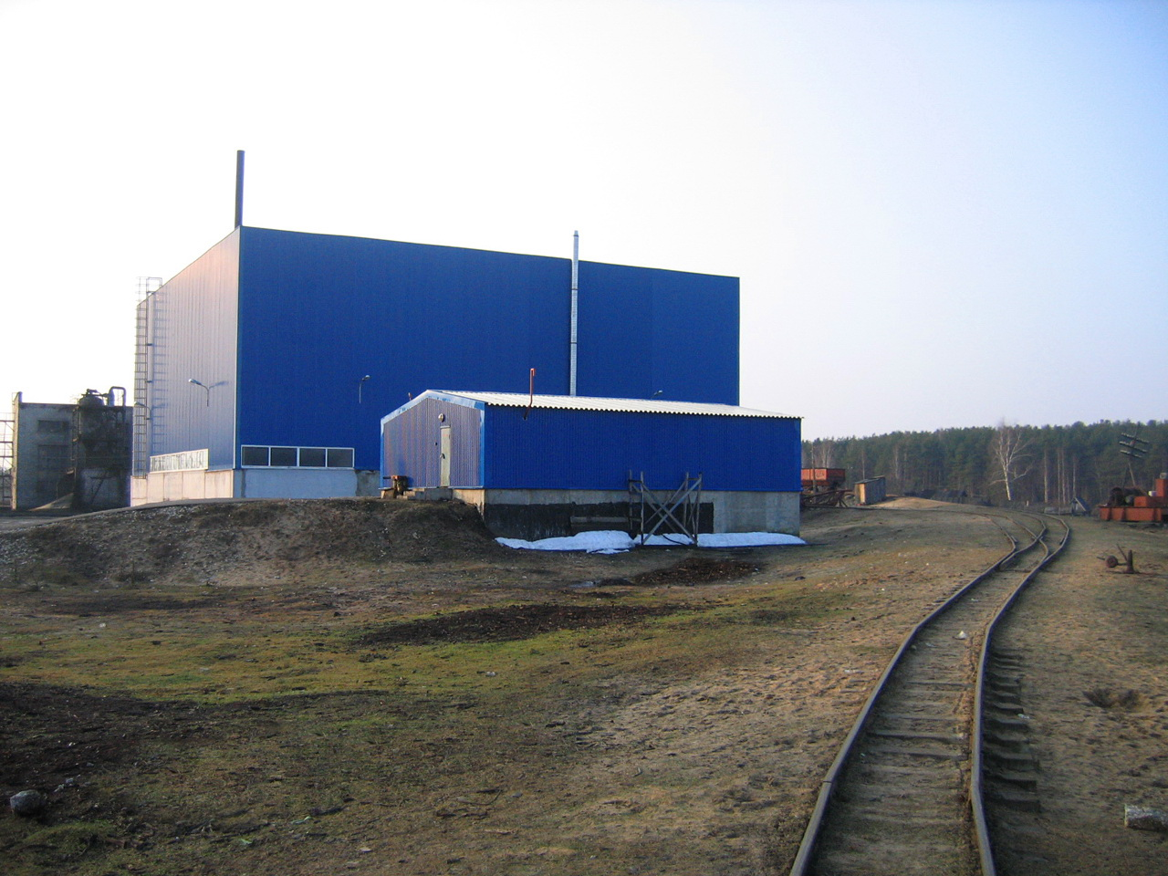 Торфобрикетный завод в пос. Керженец (Peat Briquette Factory)